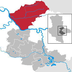 Zerbst/Anhalt in Sachsen-Anhalt - Landkreis Anhalt-Bitterfeld